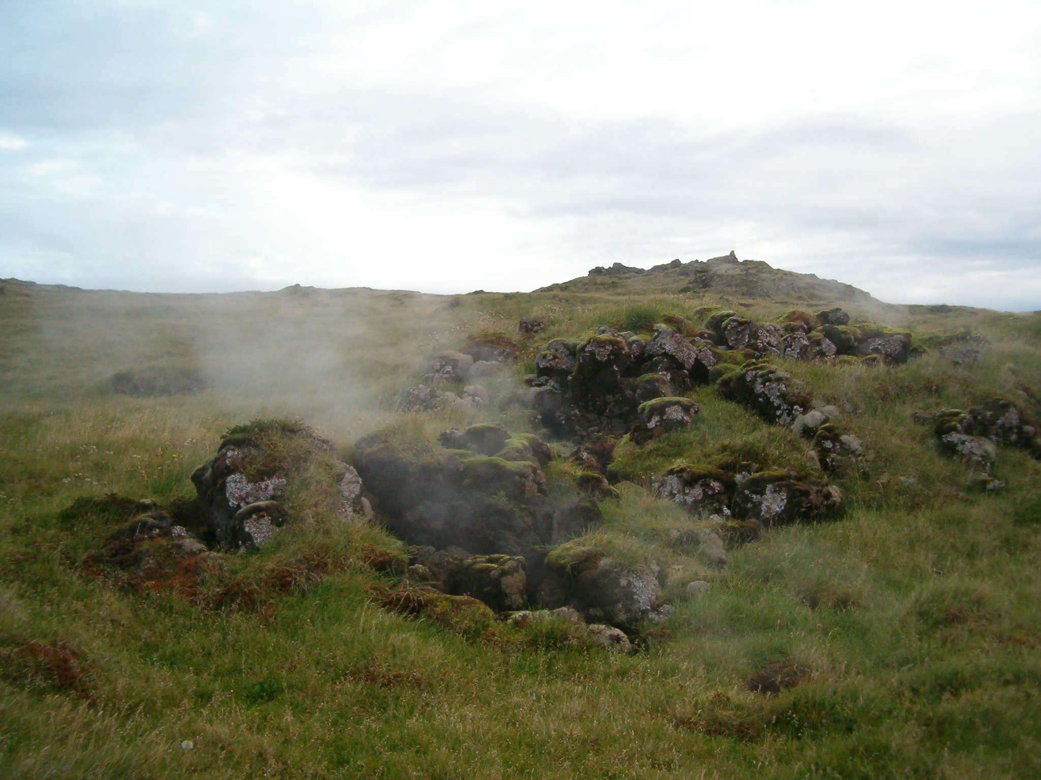 Районът около електроцентралата.